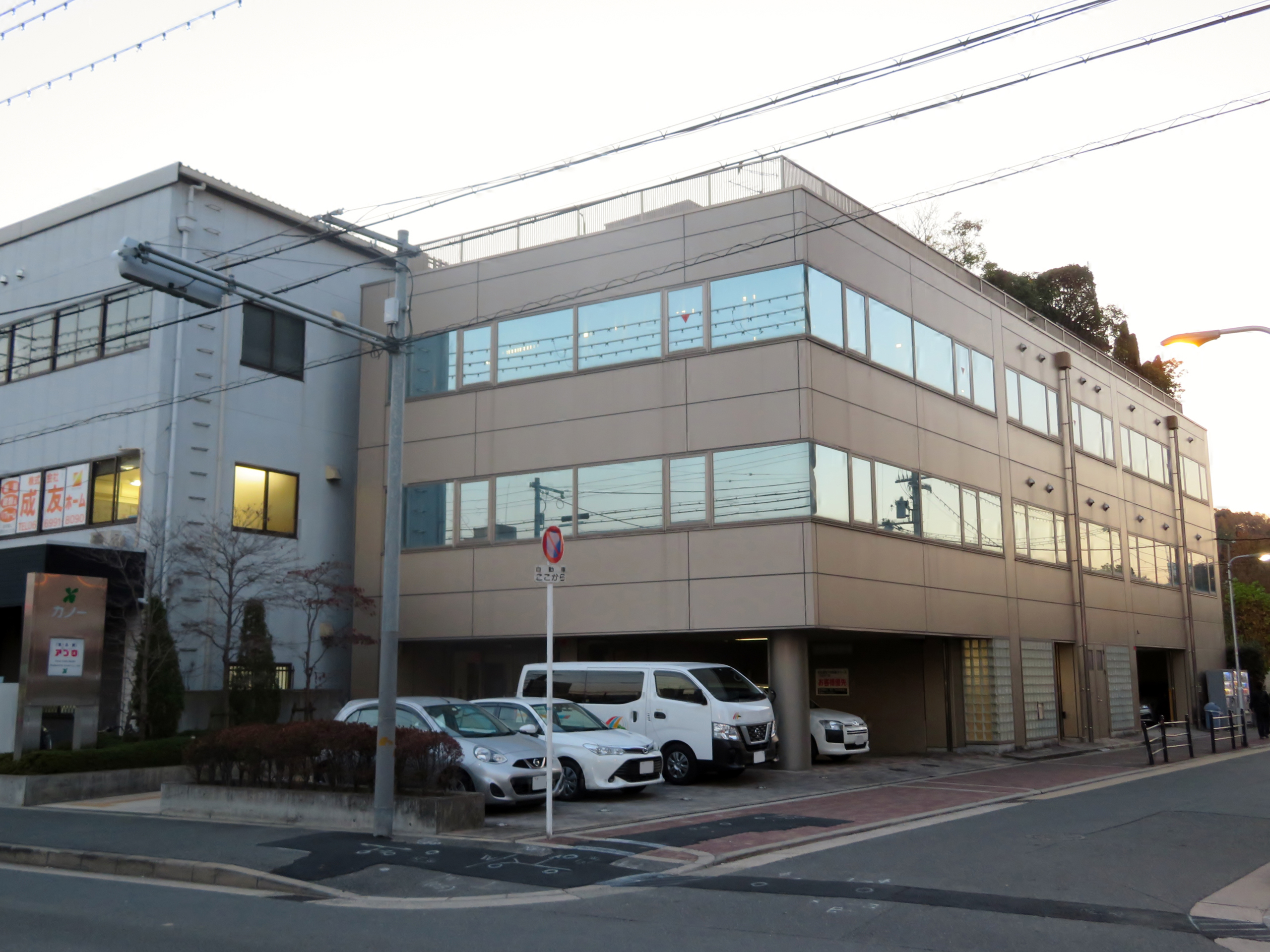 株式会社カノー本社を撮影。